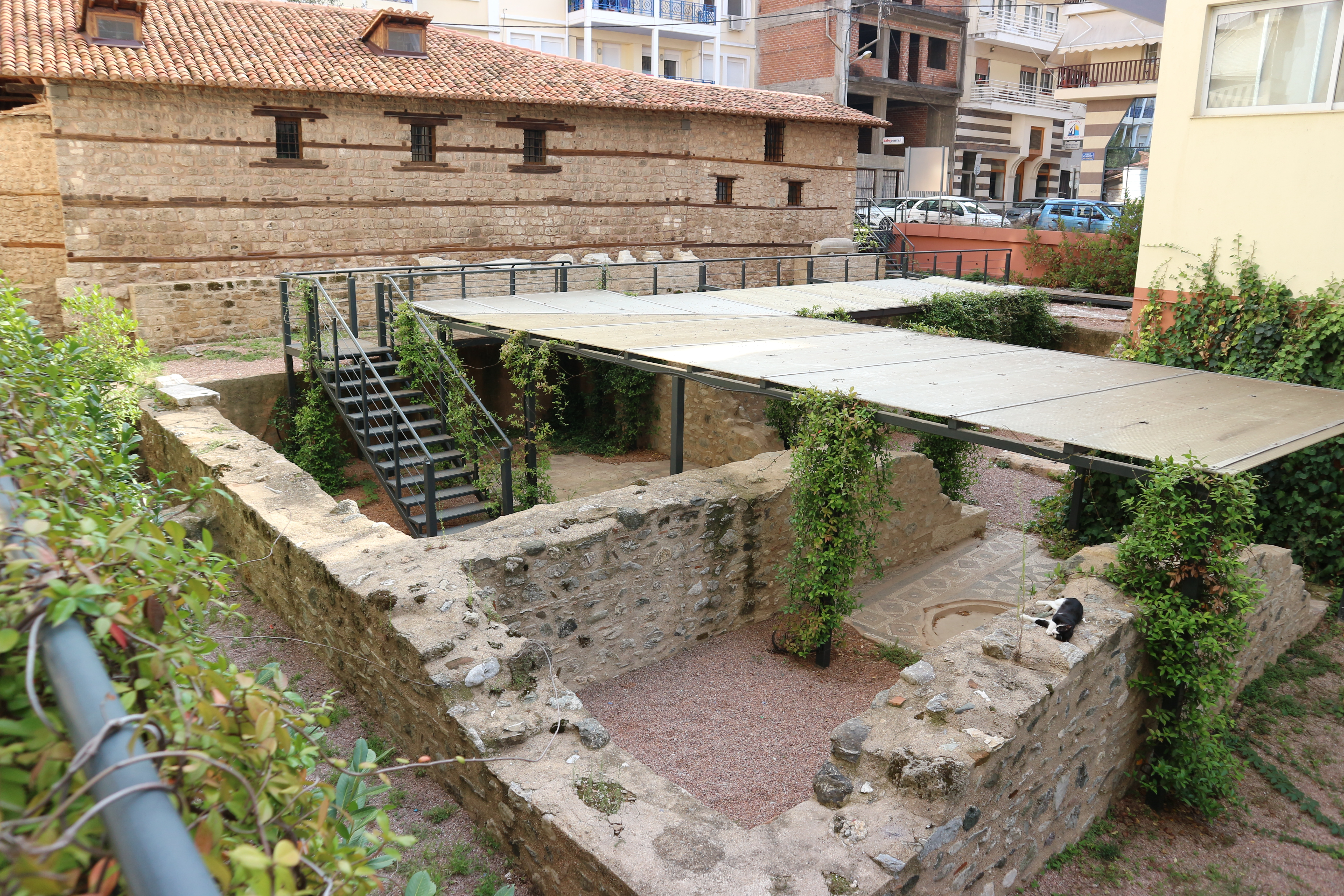 «Αρχαιολογικός χώρος Αγίου Παταπίου Βεροίας»